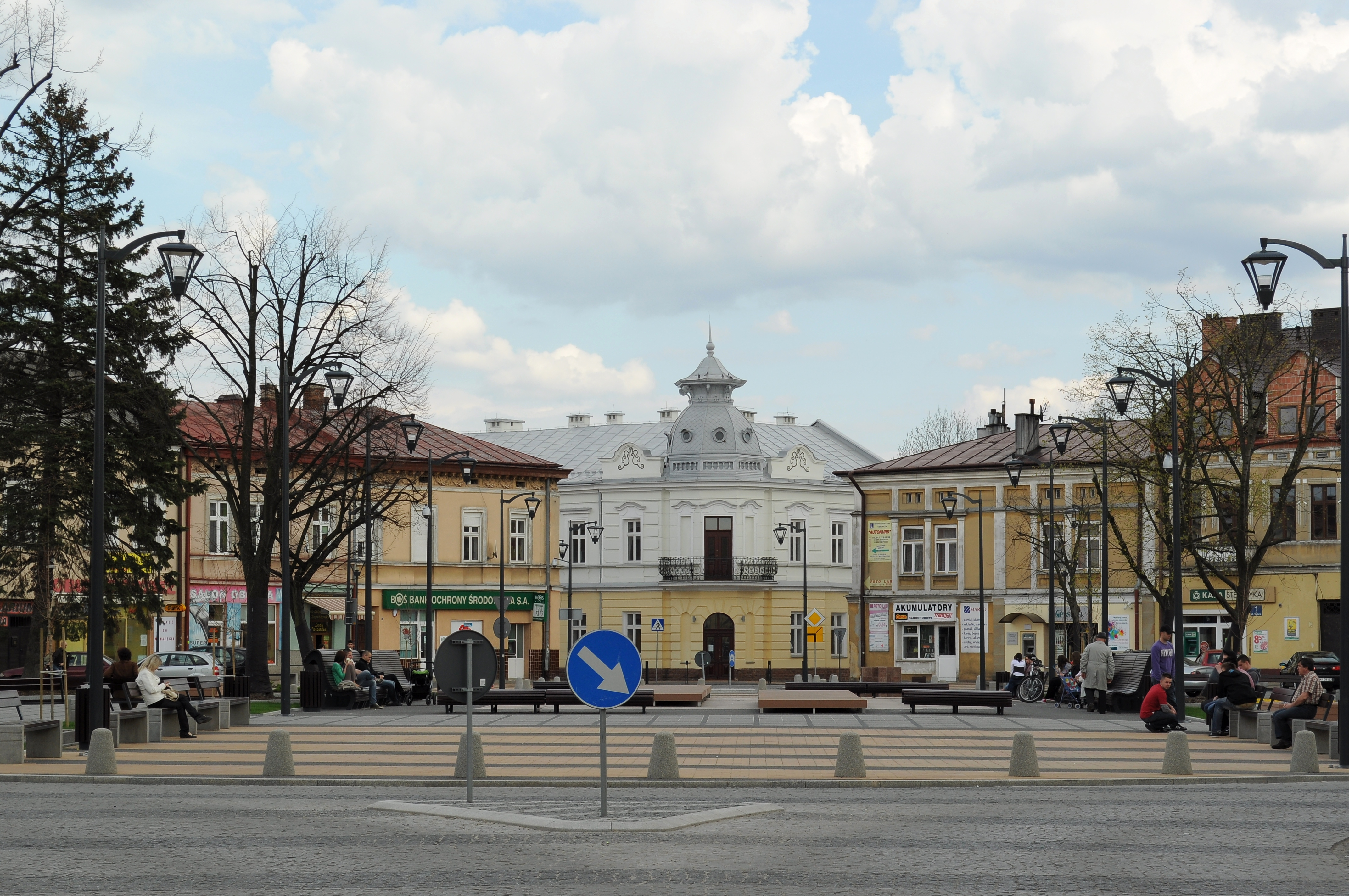 rynek w Mielcu